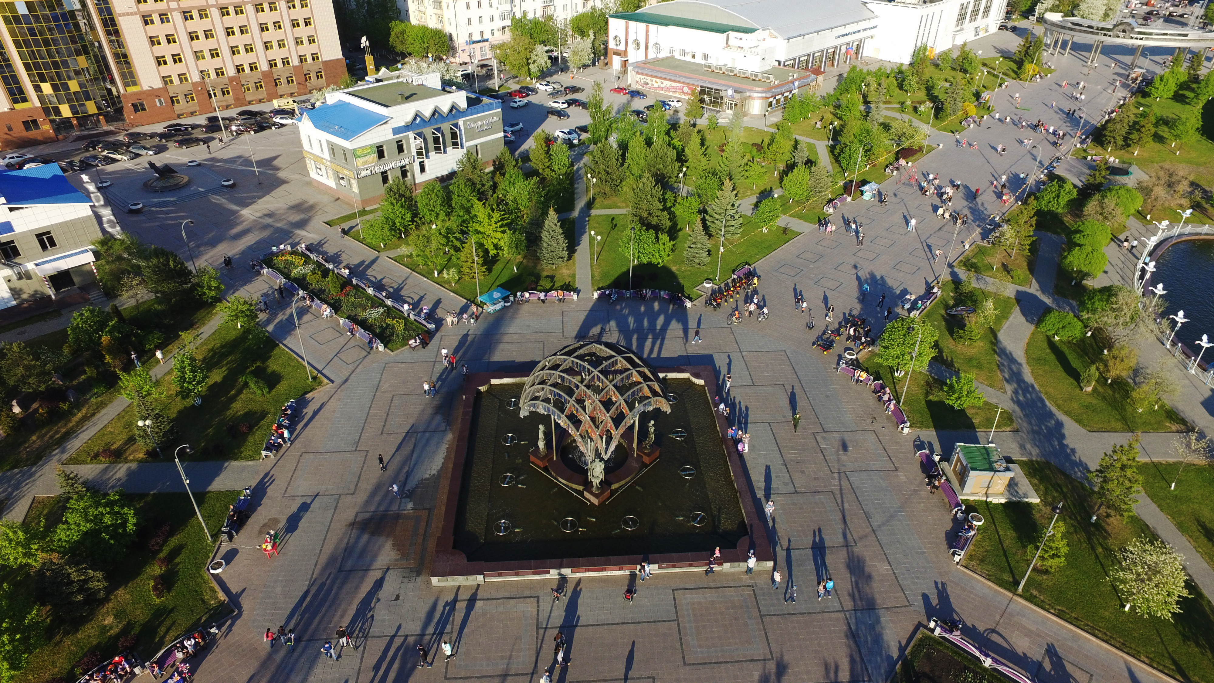 Фонтан на Цветном Бульваре